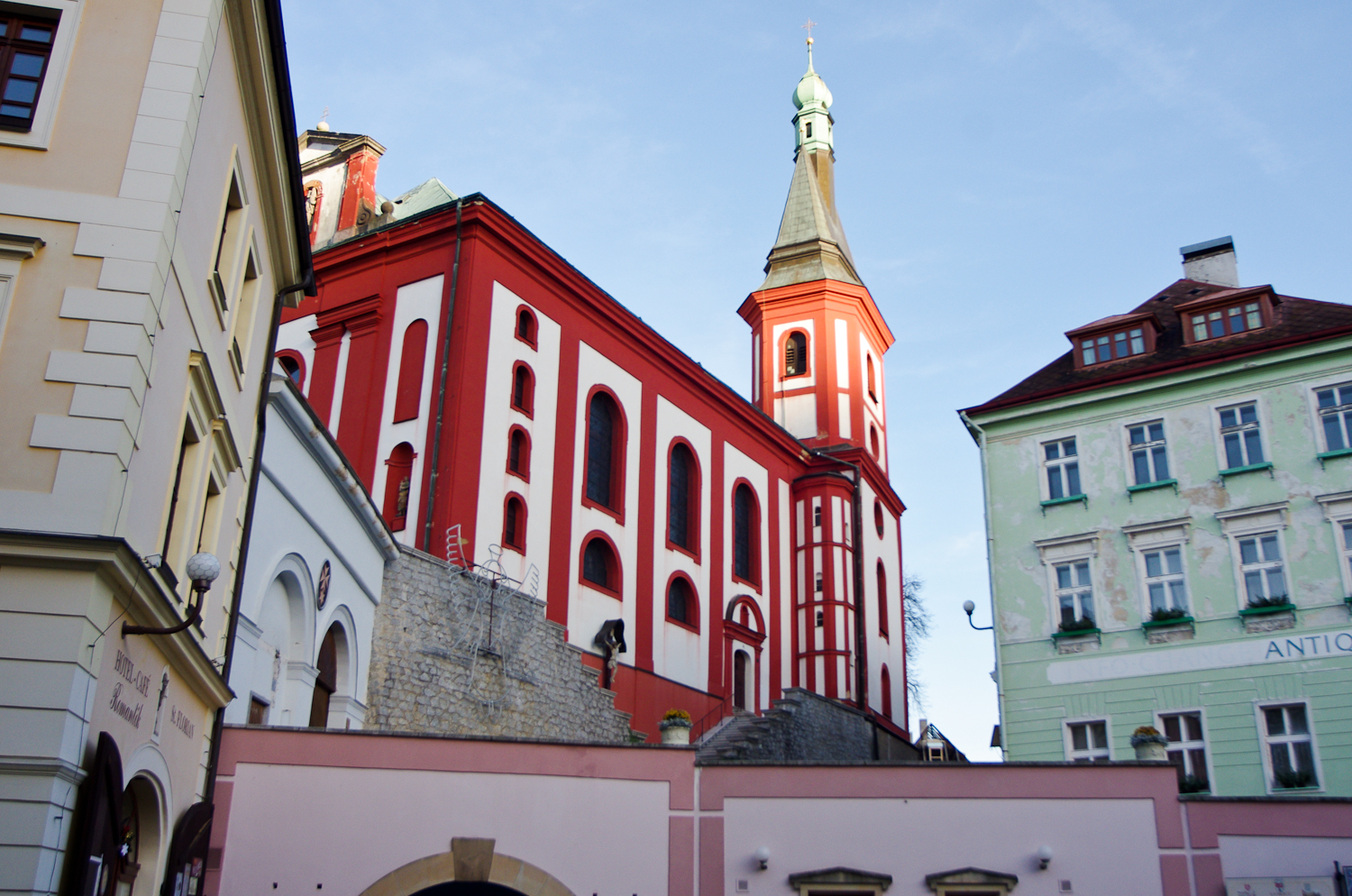 Kostel sv. Václava (Loket), Kostelní 14/3, Loket